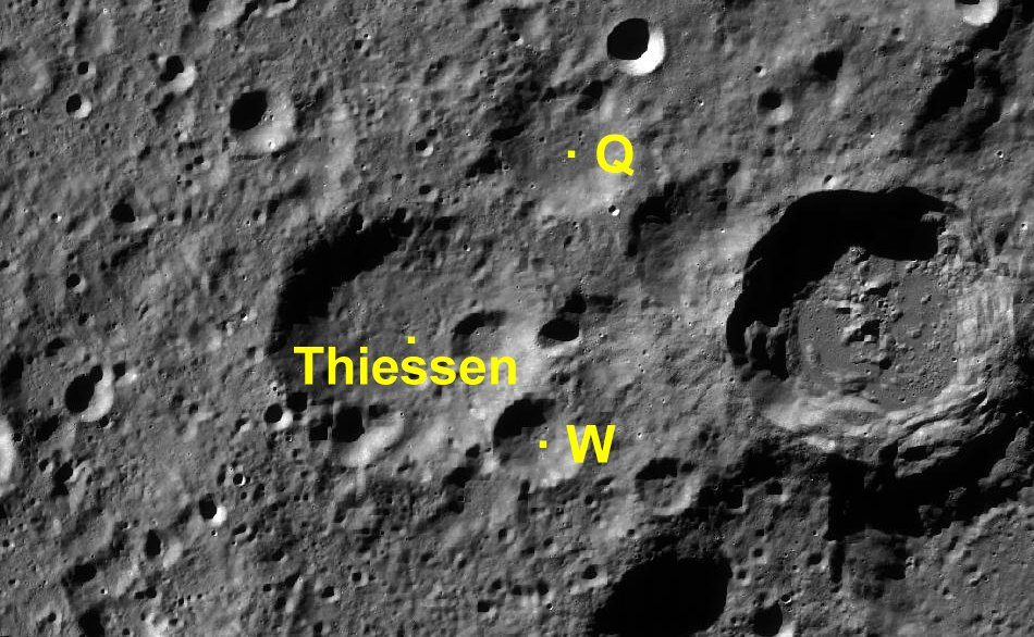 Cráter lunar Thiessen. Cráteres satélite. (Imagen LRO)